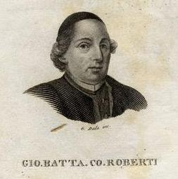 Ritratto dello scrittore Giambattista Roberti in "Opere dell'abate Giambattista Roberti di Bassano", 1830